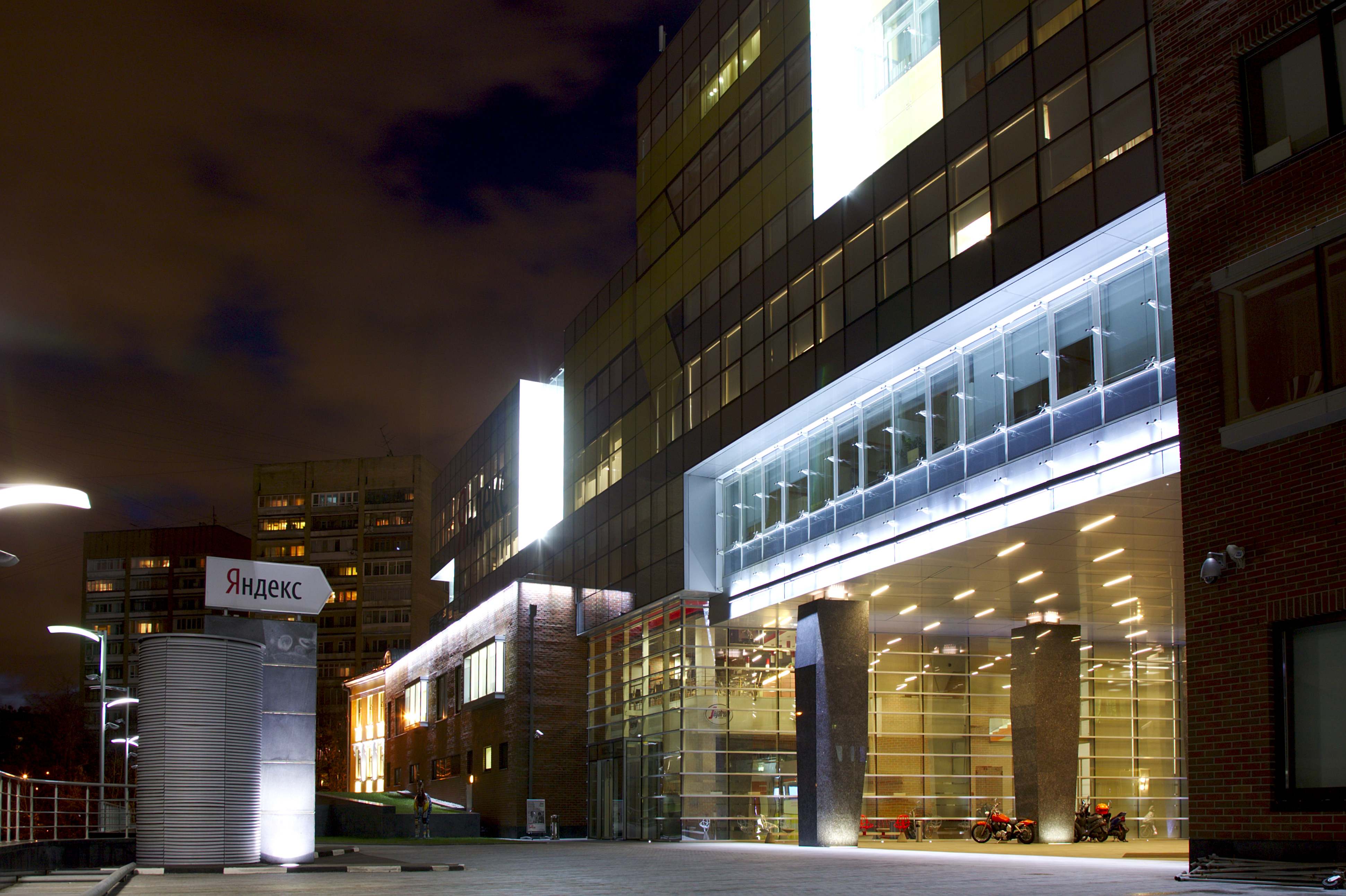 Центральный офис "Яндекса" ночью